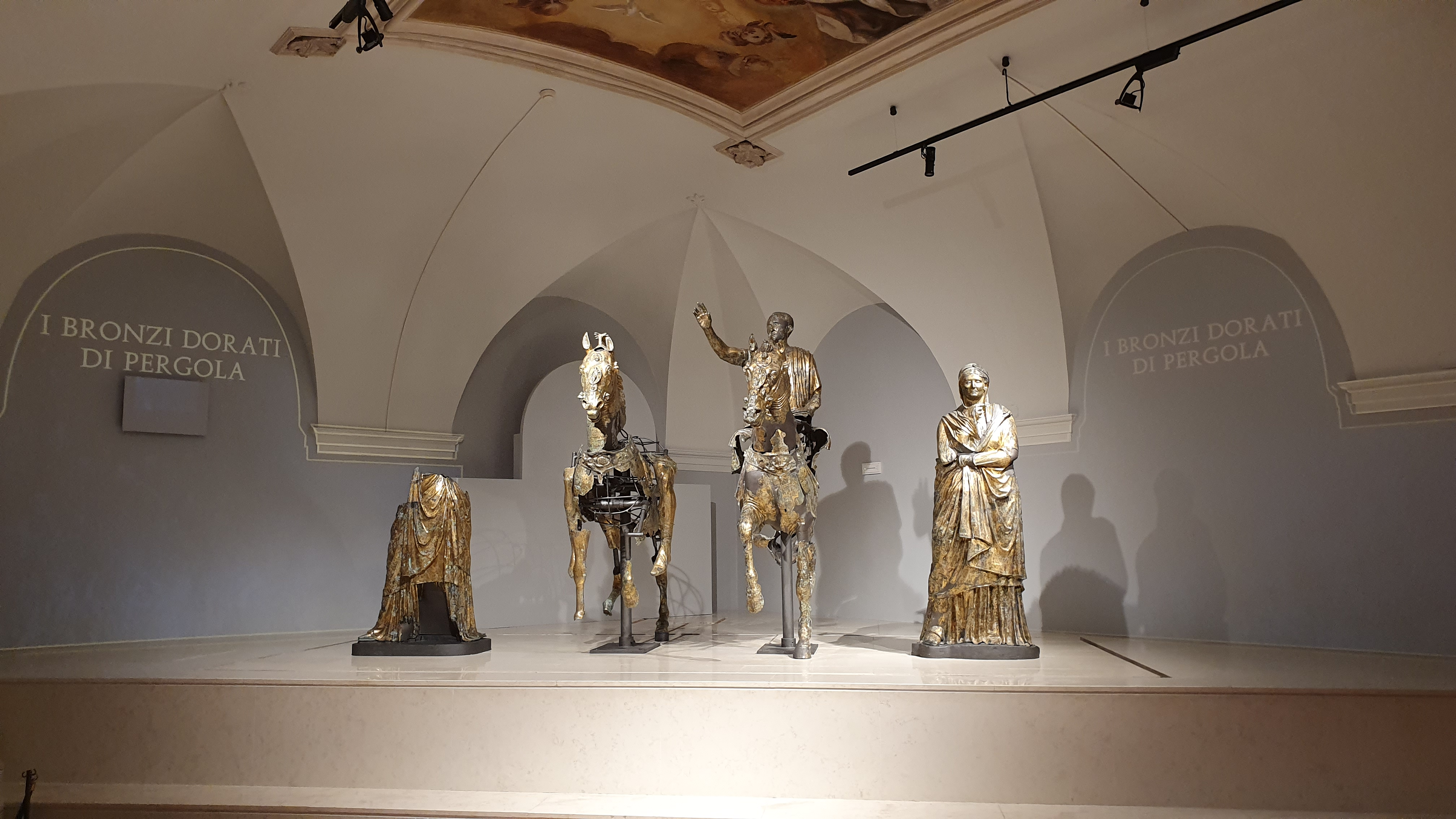 Il gruppo equestre di epoca romana dei Bronzi Dorati da Cartoceto di Pergola dopo il nuovo allestimento realizzato da Paco Lanciano